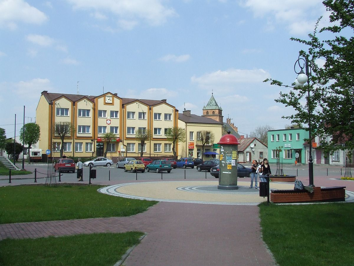 Różan